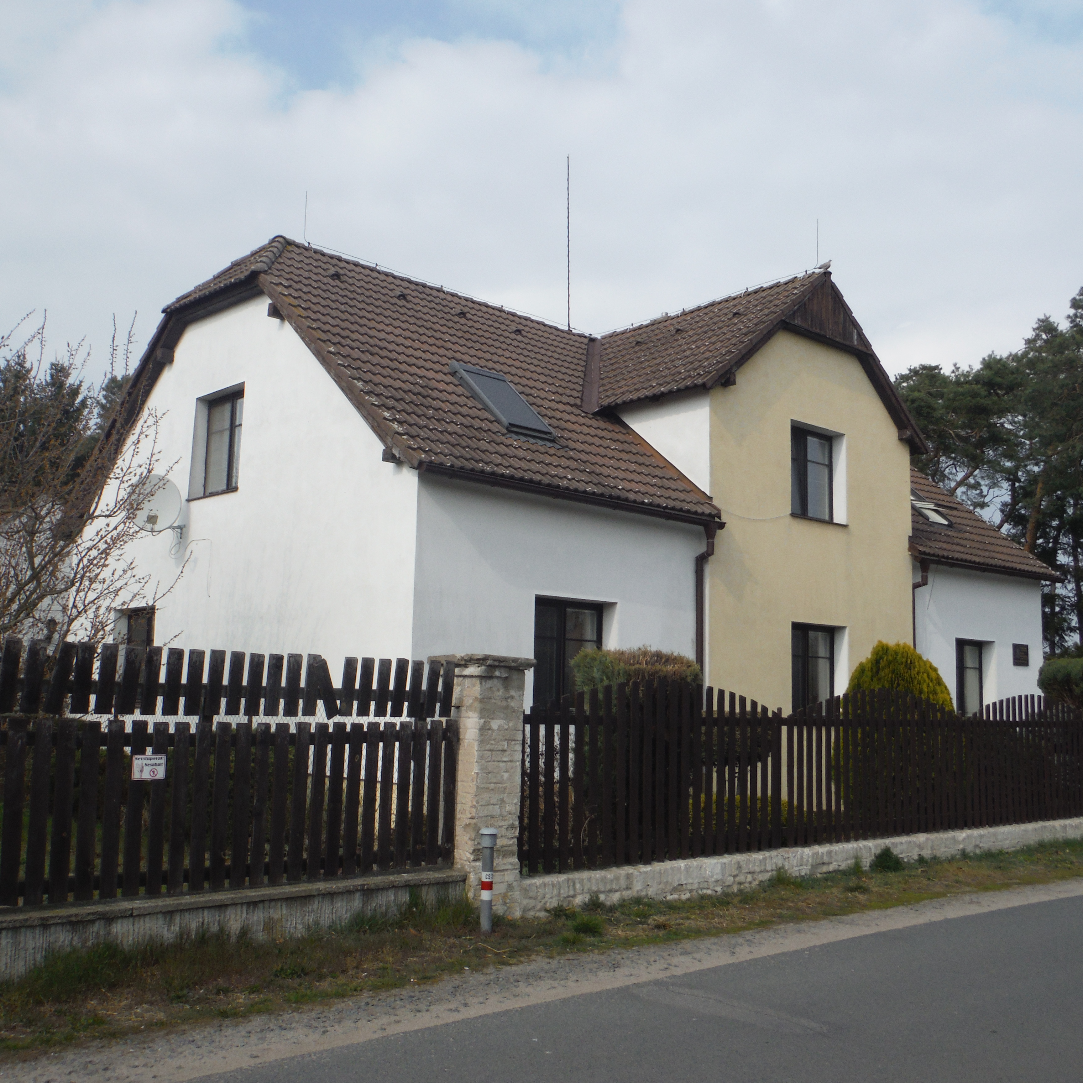 dům